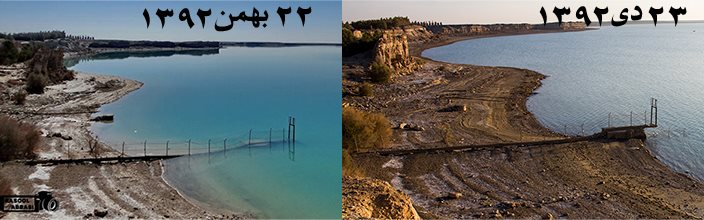 مقایسه حجم آب در ماه مختلف